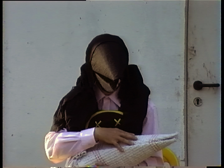 Videostill der 2-Kanal-Videoinstallation UNNESKO II die der Künstler in der von Hemma Schmutz kuratierten Ausstellung "Regionalismus" 2013 im Salzburger Kunstverein zeigte.